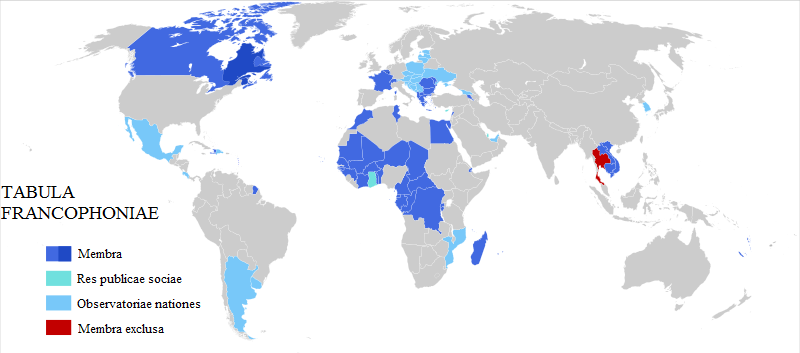 Tabula Francophoniae